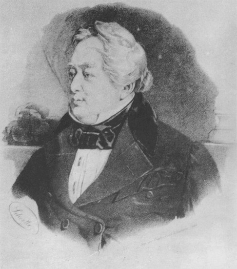 Портрет Петра Борисовича Козловского